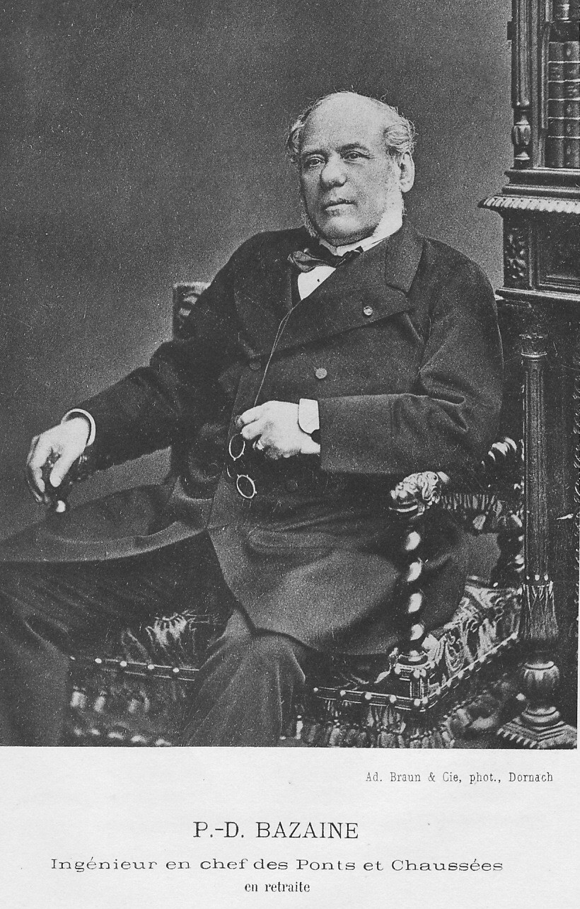 Pierre-Dominique Bazaine (1809- 1893), ingénieur des Ponts & Chaussée